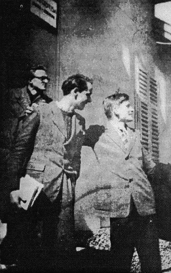 Dijaki ilegalne gimnazije zapuščajo šolo.